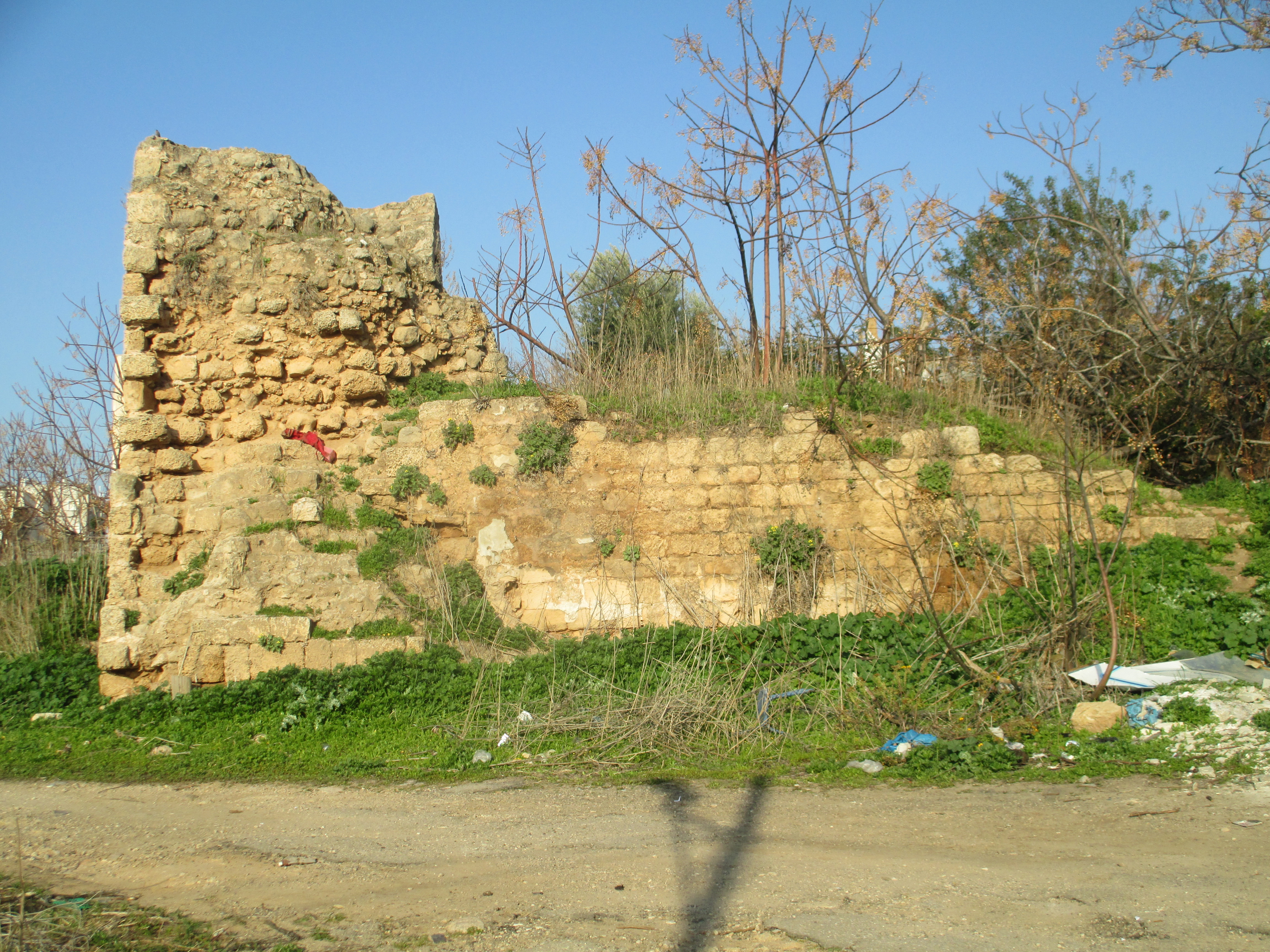 מצודת אום חאלד בנתניה